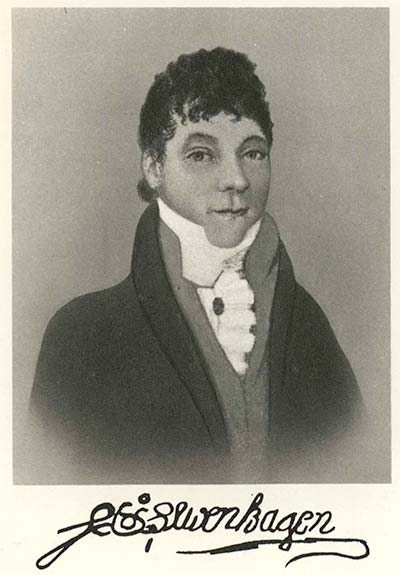 Johan Peter Lewenhagen (1770-1832)